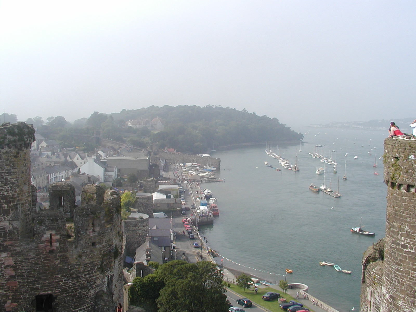 Conwy o'r castell